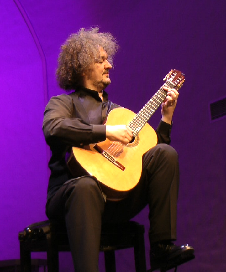 Зоран Дукич на концерте в Санкт-Петербурге.